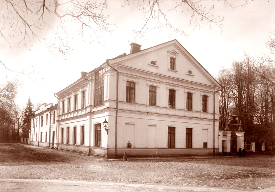 Varasemalt Lossi 36 aadressil asunud naistekliinik